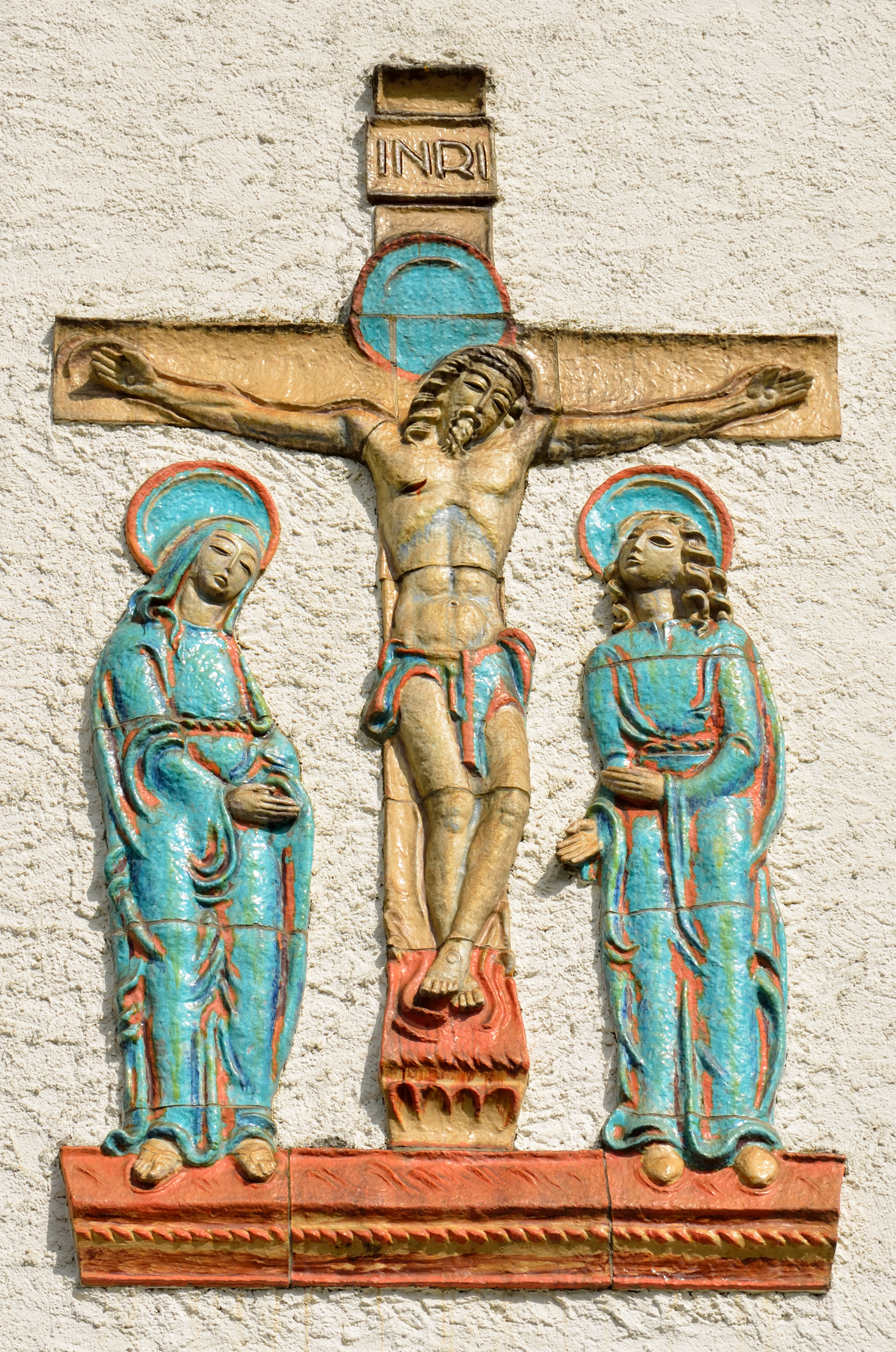 An der Westfassade der Filialkirche Böham, die Kirche im Gemeindegebiet von Bischofshofen, befindet sich eine Kreuzigungsgruppe in Majolika des Radstädter Bildhauers Leo Miller.